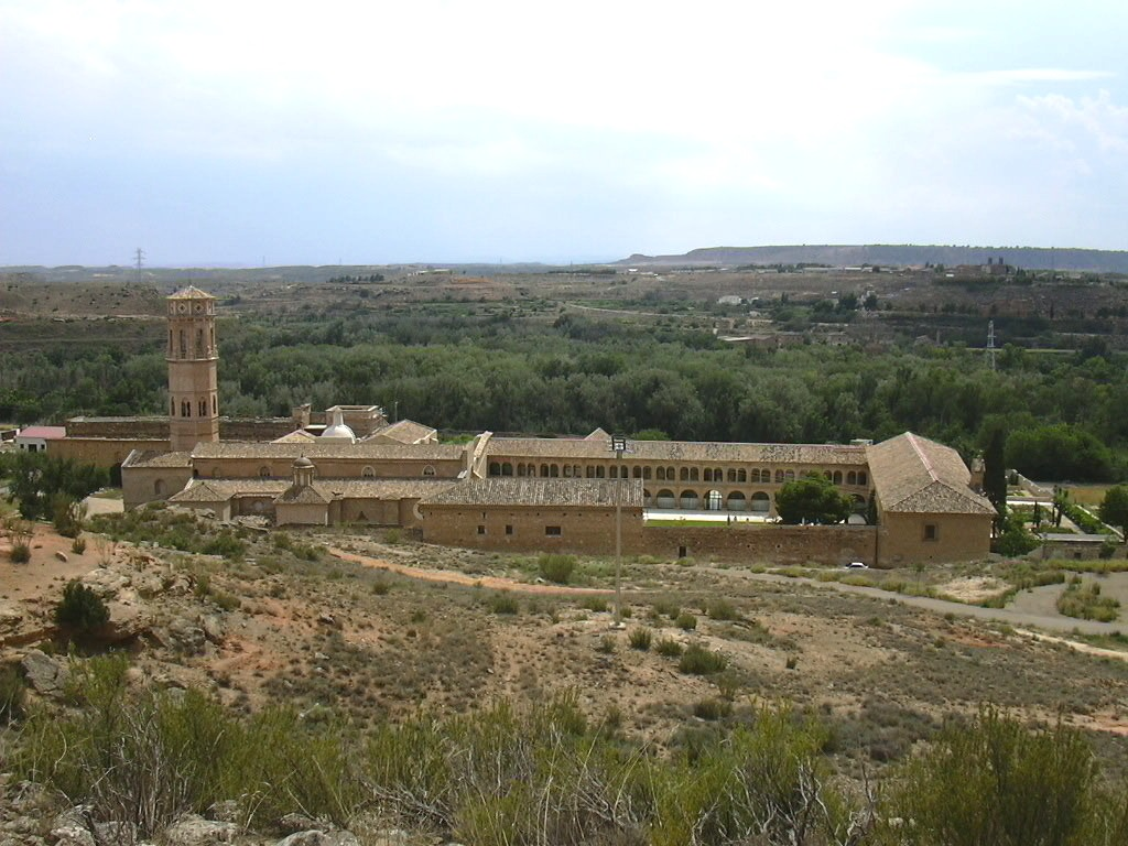 Rueda - Vista general